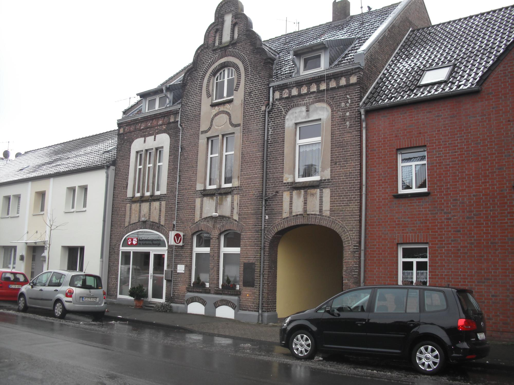 ehem. Haus der Familie Herz